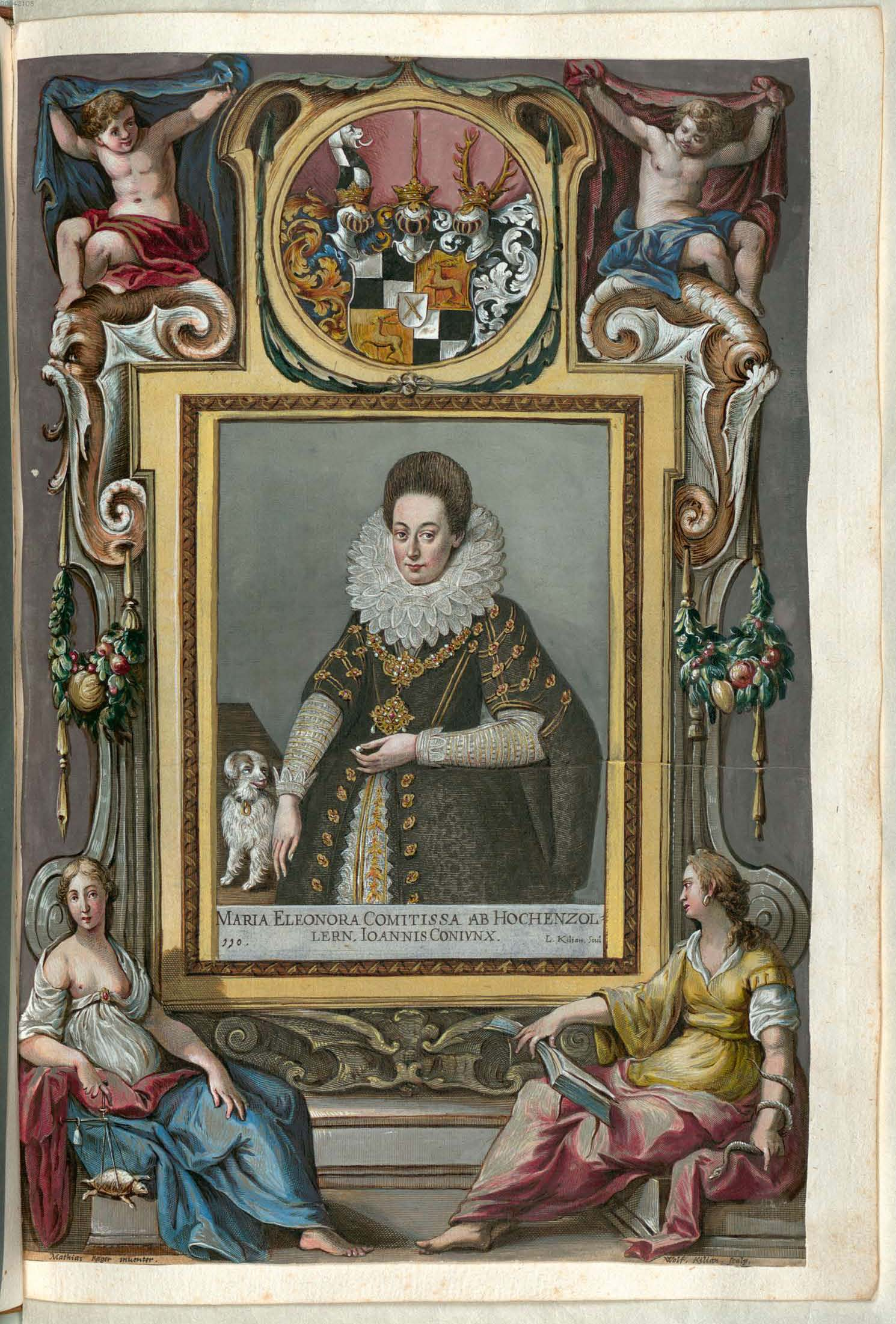 Fuggerorum et Fuggerarum imagines wurde 1588 von Philipp Eduard Fugger beim Kupferstecher Dominicus Custos in Auftrag gegeben. Das Werk enthält mit Aquarell- und Gouache-Farbe kolorierte Stiche der Mitglieder der Fugger von der Lilie. Der Druck von 1618 stellt das einzige kolorierte Exemplar dar.